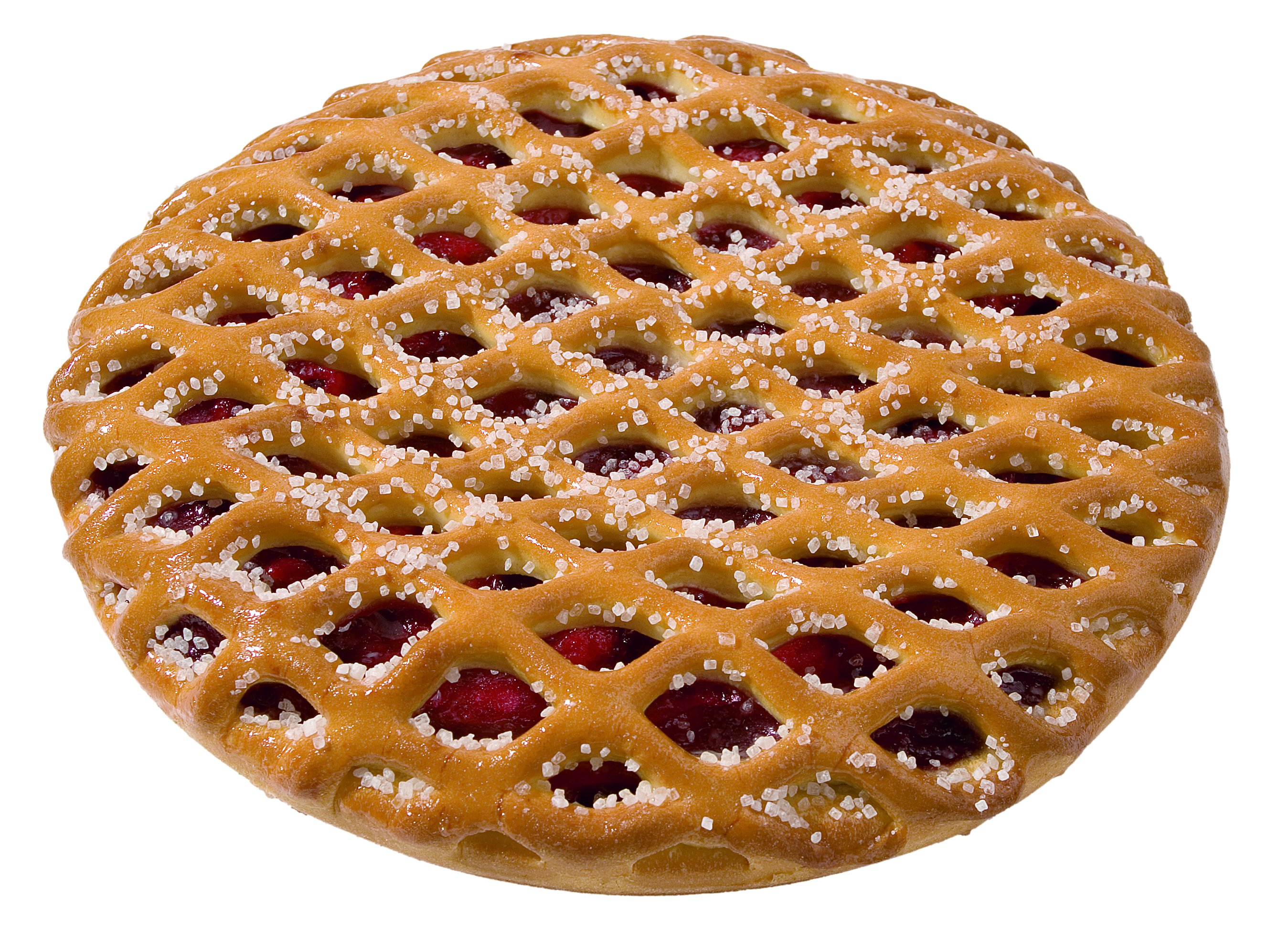 Kirsch-Vlario mit Gitter, Autor Vlario